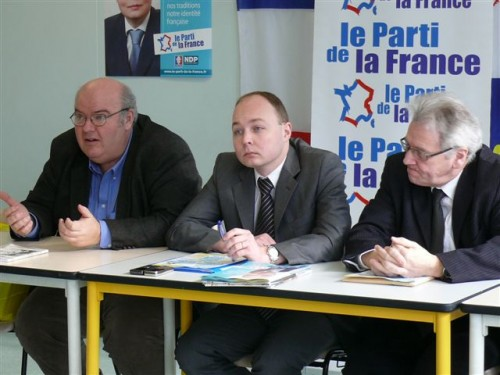 thomas joly